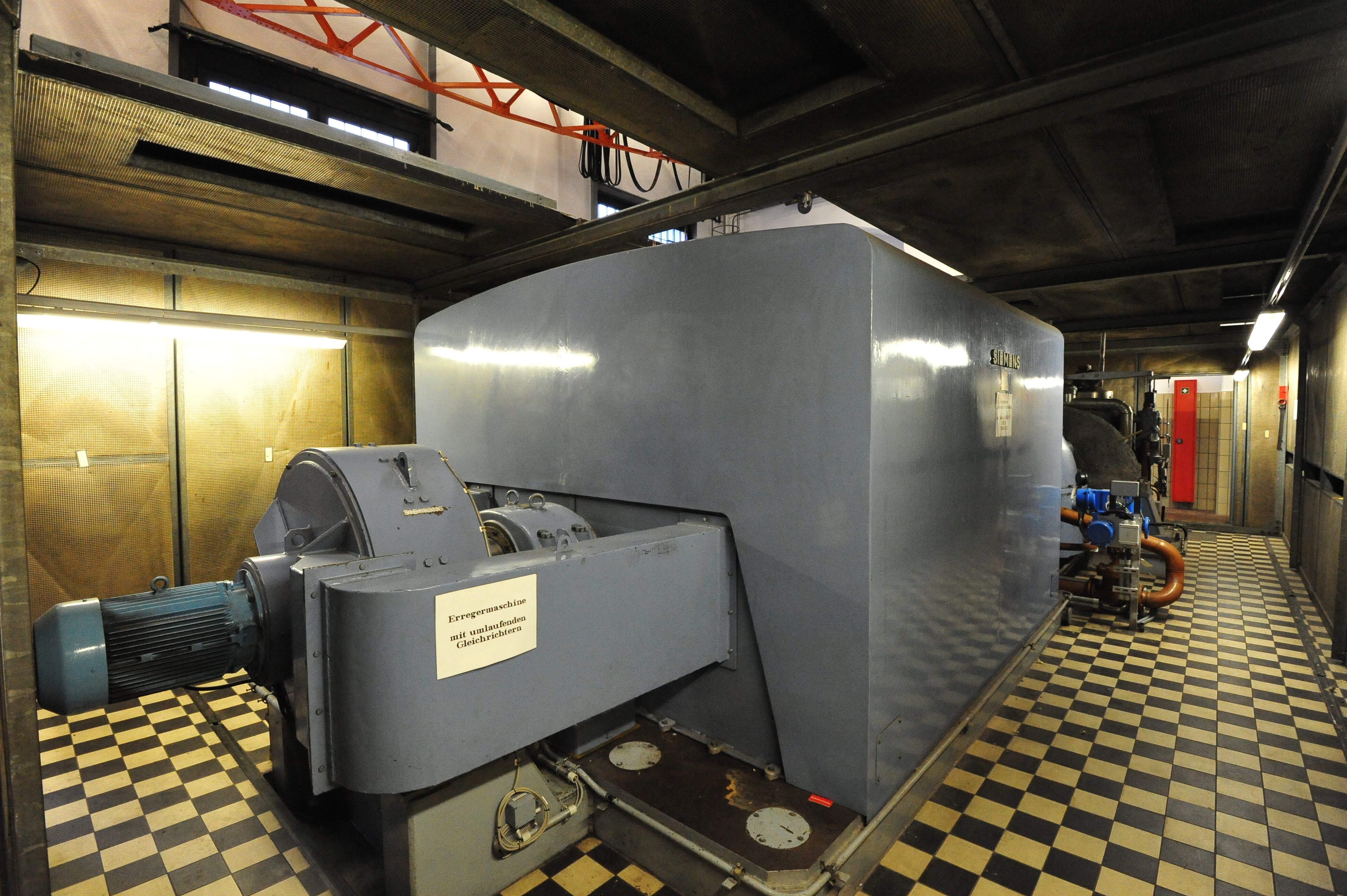 Heizkraftwerk Alt-Oberhausen (HKW 1) - Maschinenhalle, Blick in Schallhaube T1